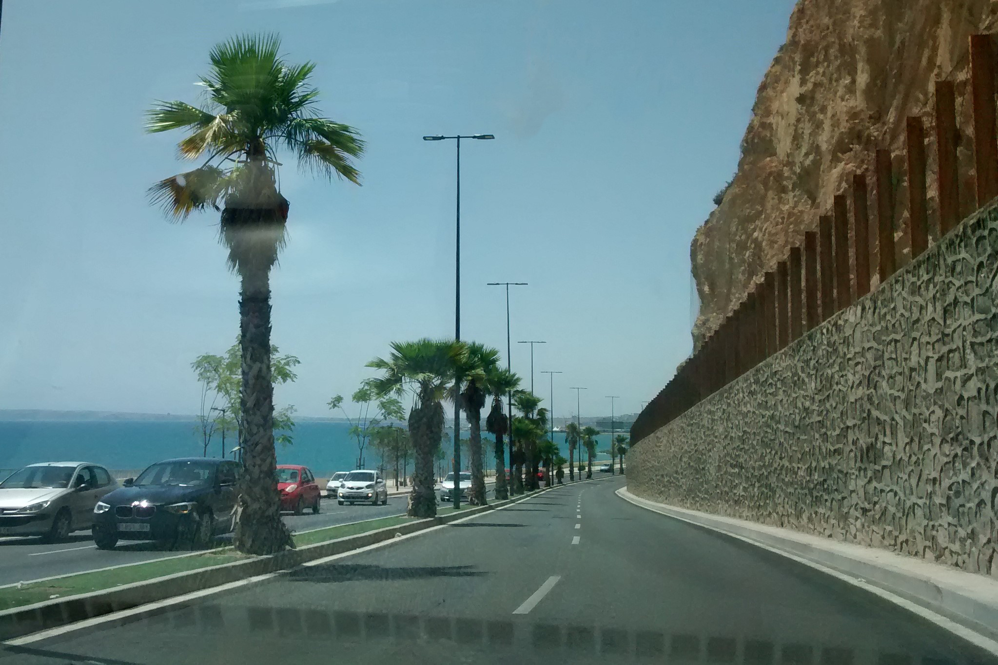 Avenida de Villajoyosa (Alicante, España)